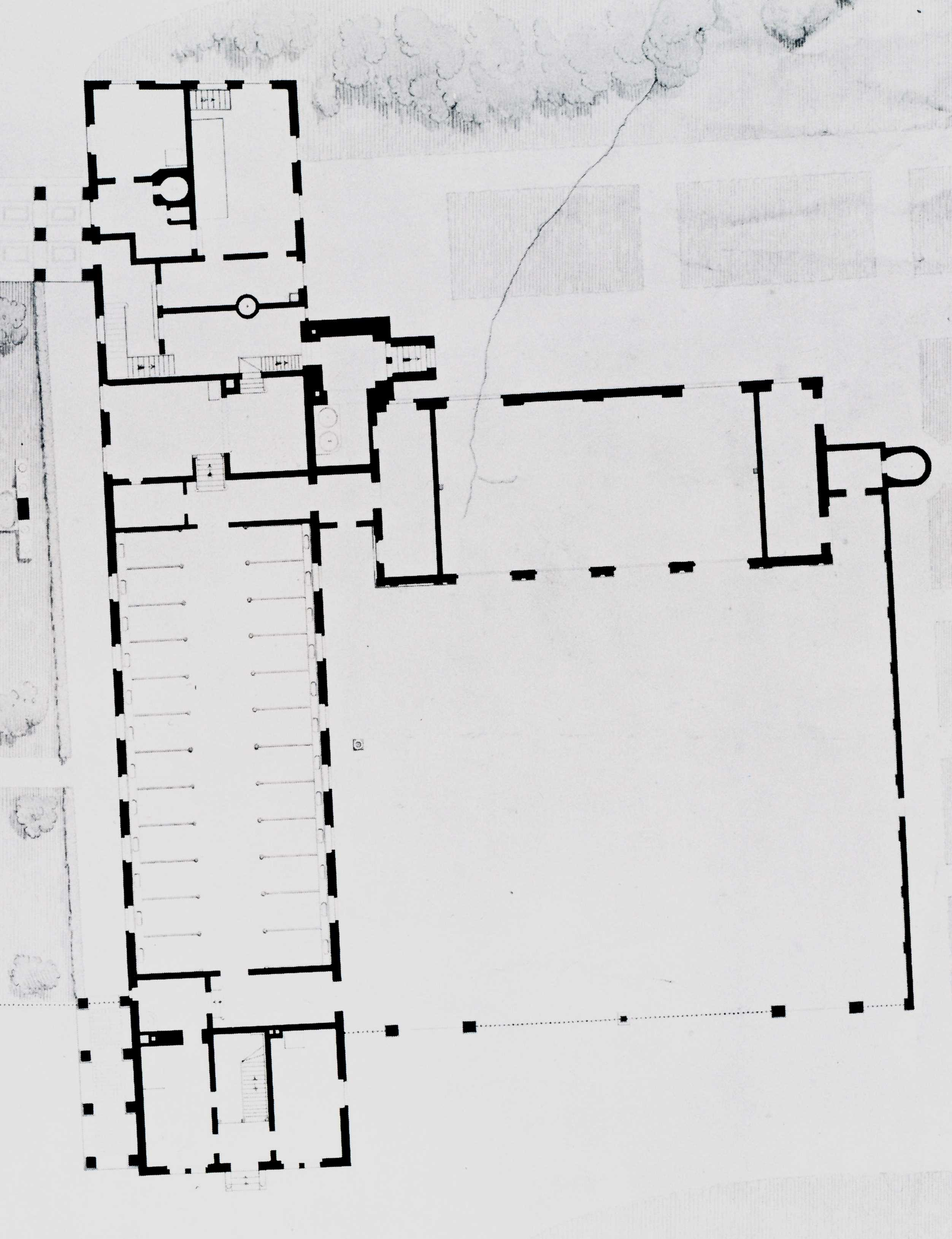 Grundriss Kavalierflügel und Remise (Persius nach Schinkel 1832)